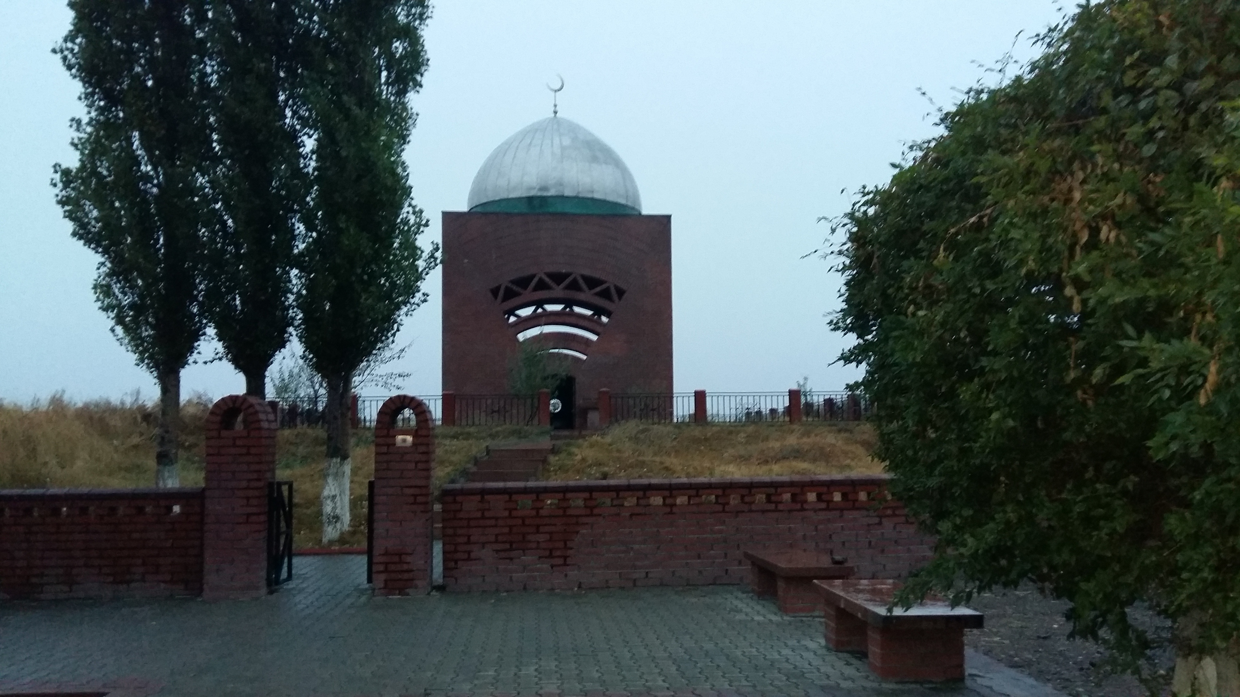 Мавзолей Суюнбая Аронулы, он же Суюнбай ата (1815-1898).